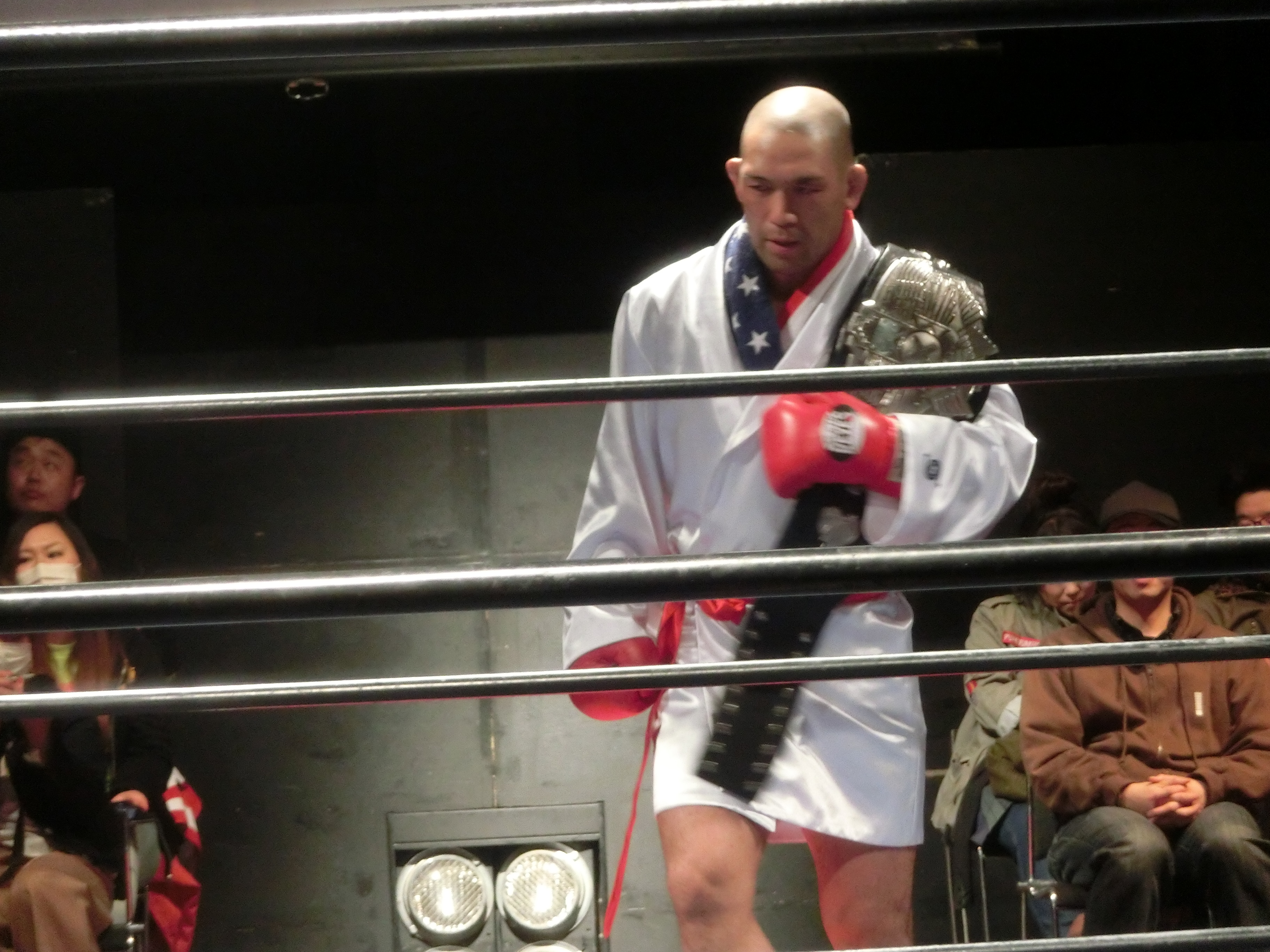 ニコプロ presents ハードヒット〜湾岸MOON RISE